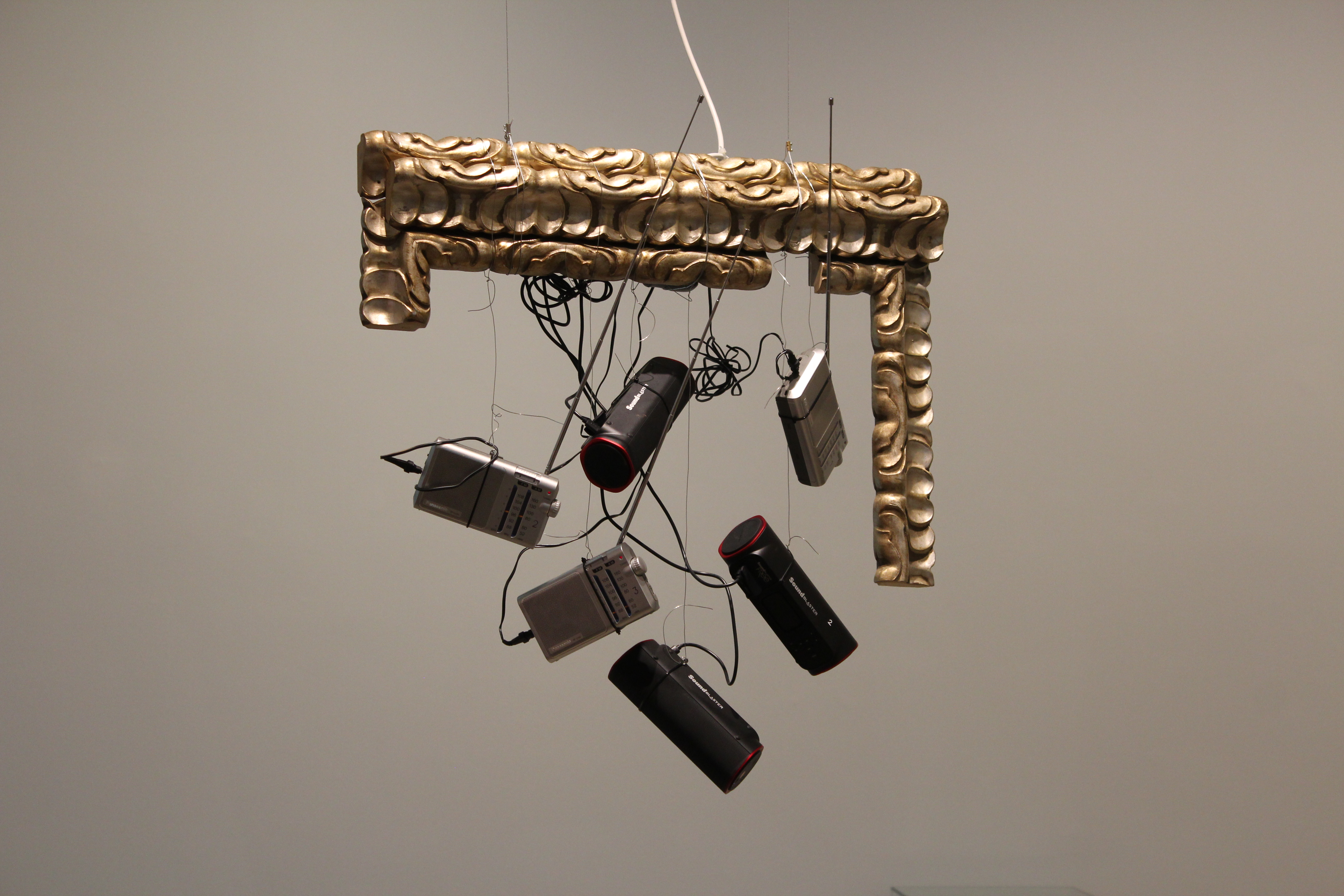 Vincenzo Succo exposat al Museo Patio Herreriano de Valladolid. Obra de Vicens Vacca